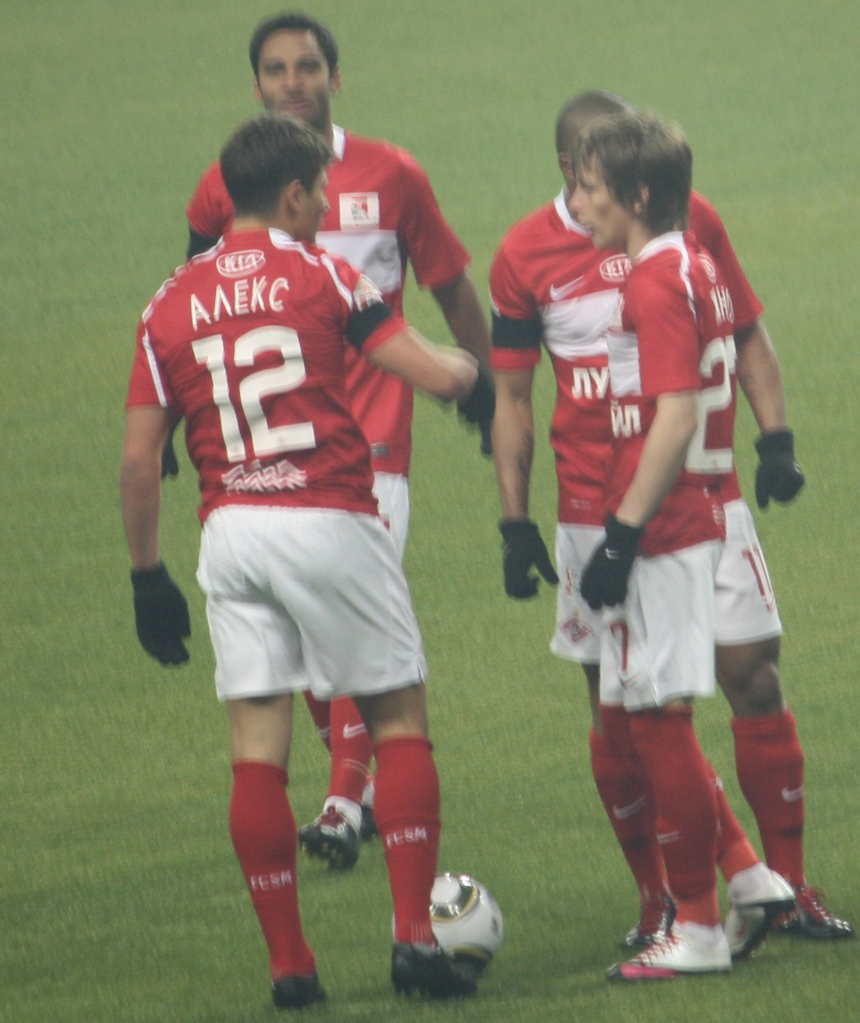 Алекс (слева), Жано (справа), Ибсон (слева на дальнем плане) и Веллитон (справа за Жано)